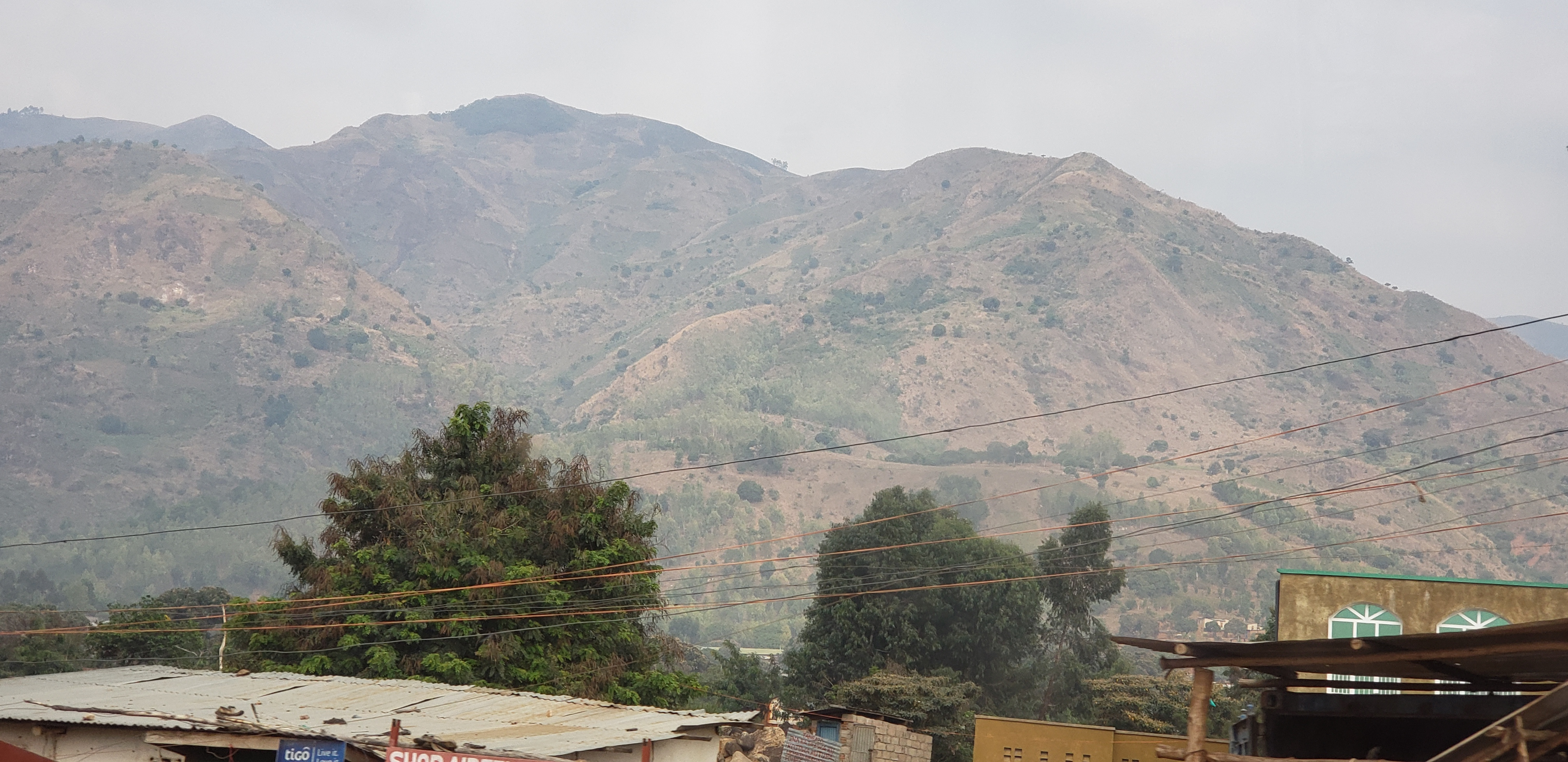 Cette image présente le relief dans l'EST de la RDC. This is an image with the theme "Africa on the Move or Transport" from: Democratic Republic of the Congo